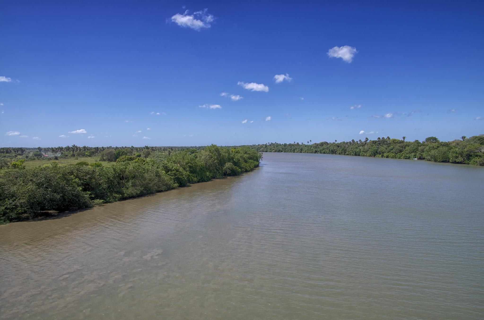 Águas do Maranhão